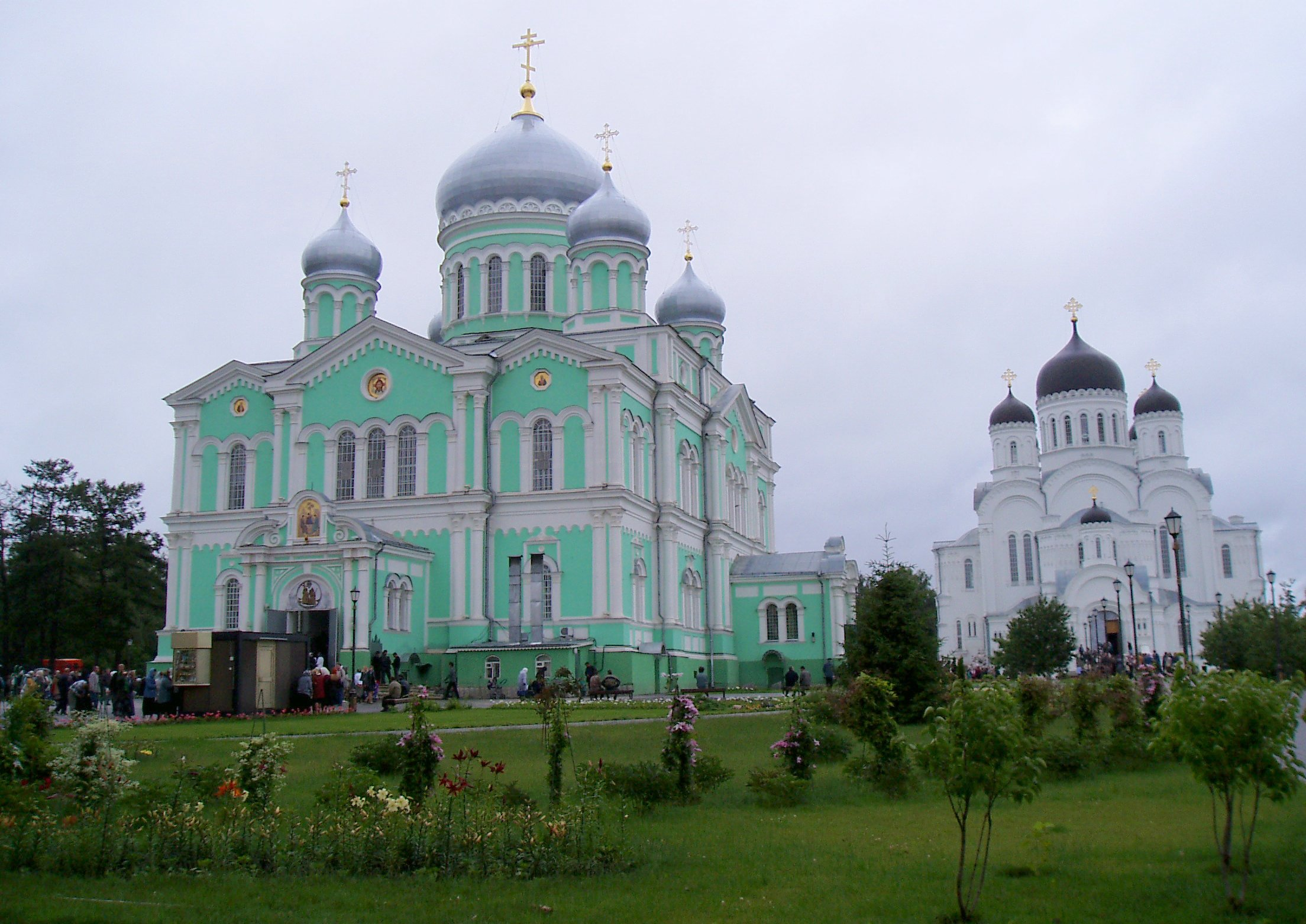 Троицкий собор (слева) и Преображенский собор (справа)